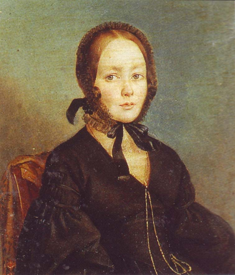 Портрет Анны Петровны Керн. В современной атрибуции считается портретом Анны Ивановны Бегичевой (1807-1879), с 1844 года жены адмирала П. А. Колзакова.